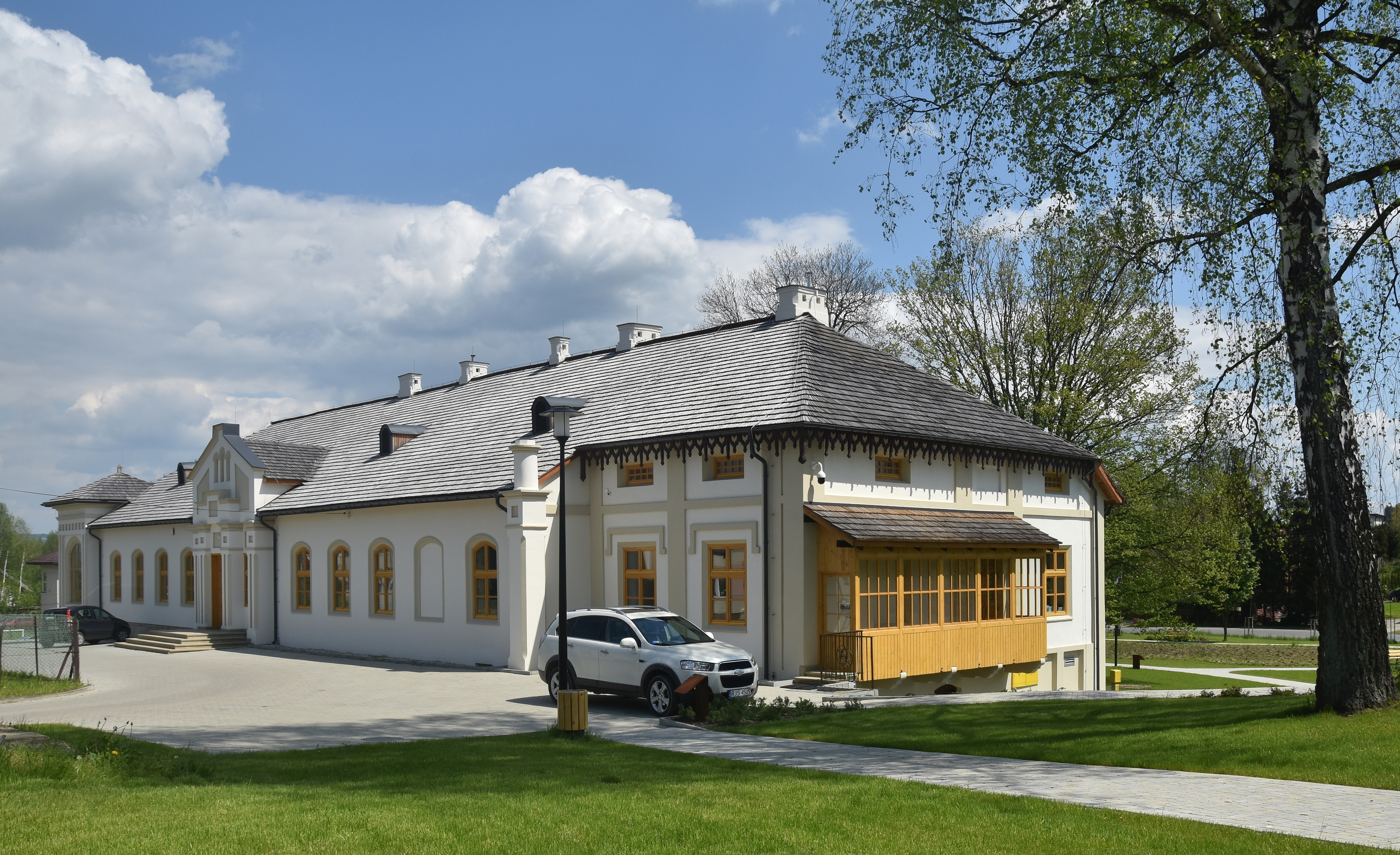 wieś Jaszczew